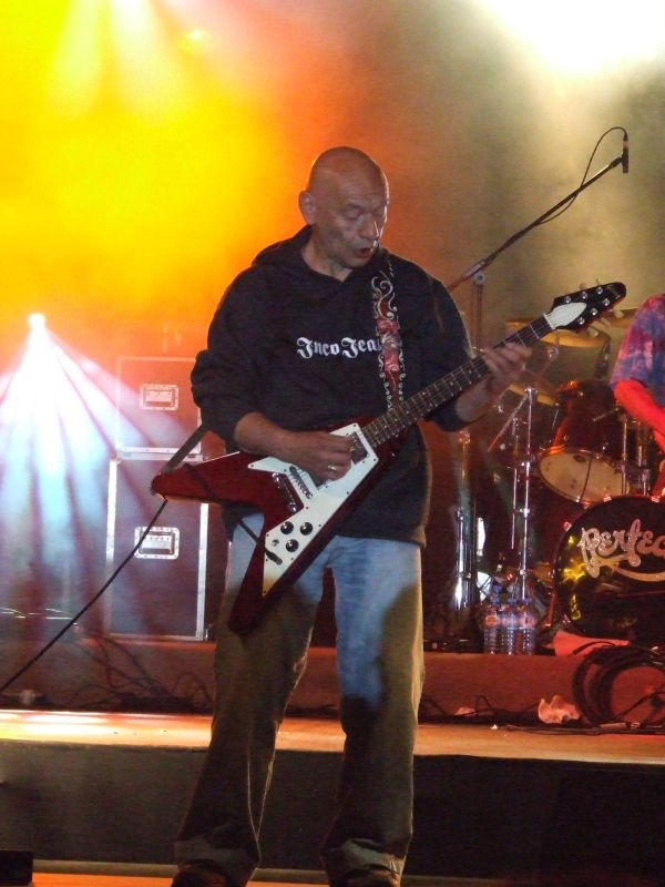 Darek Kozakiewicz with Gibson Flying V